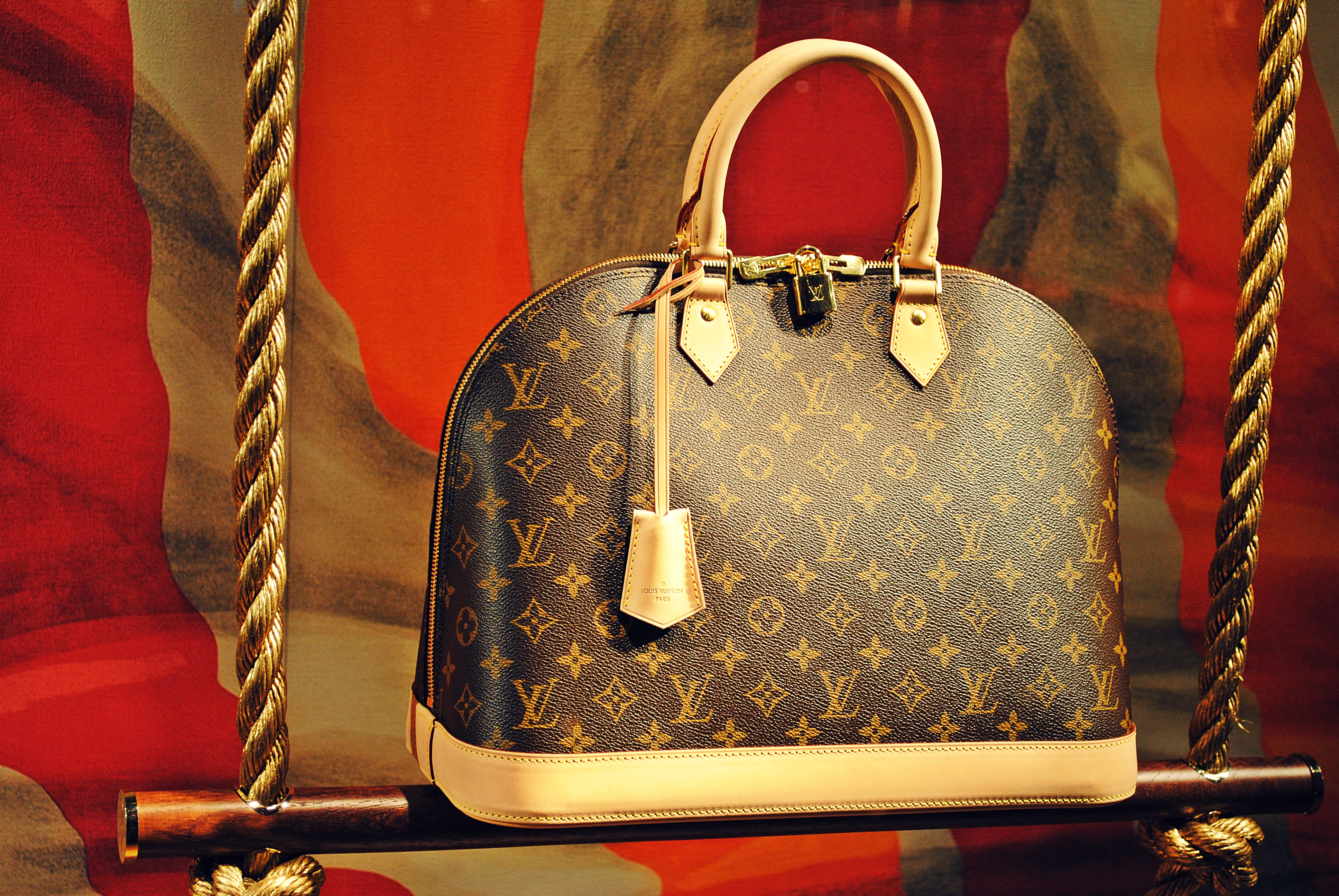 Louis Vuitton